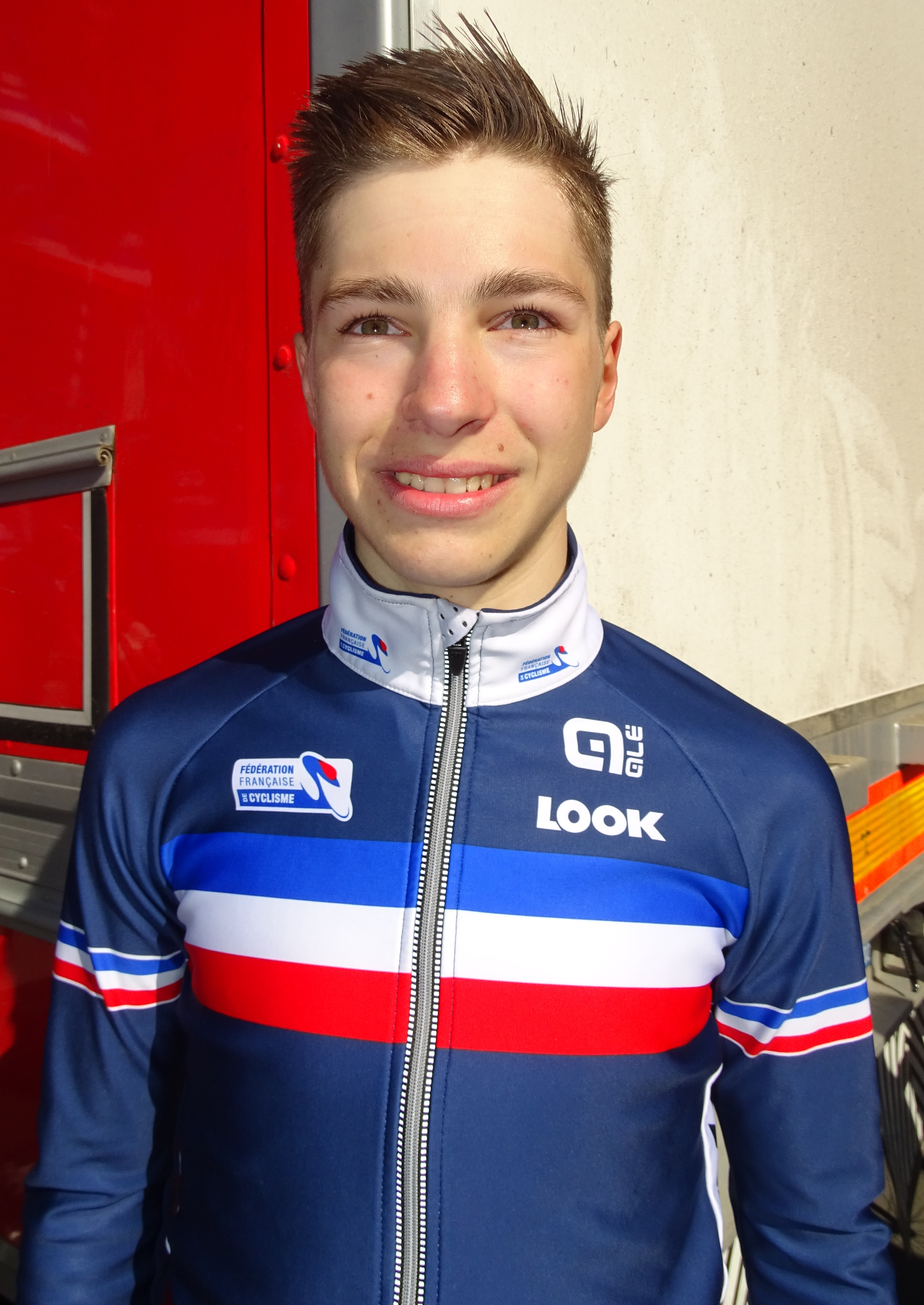 Reportage réalisé le dimanche 10 avril à l'occasion du départ du Paris-Roubaix juniors 2016 à Saint-Amand-les-Eaux, France.